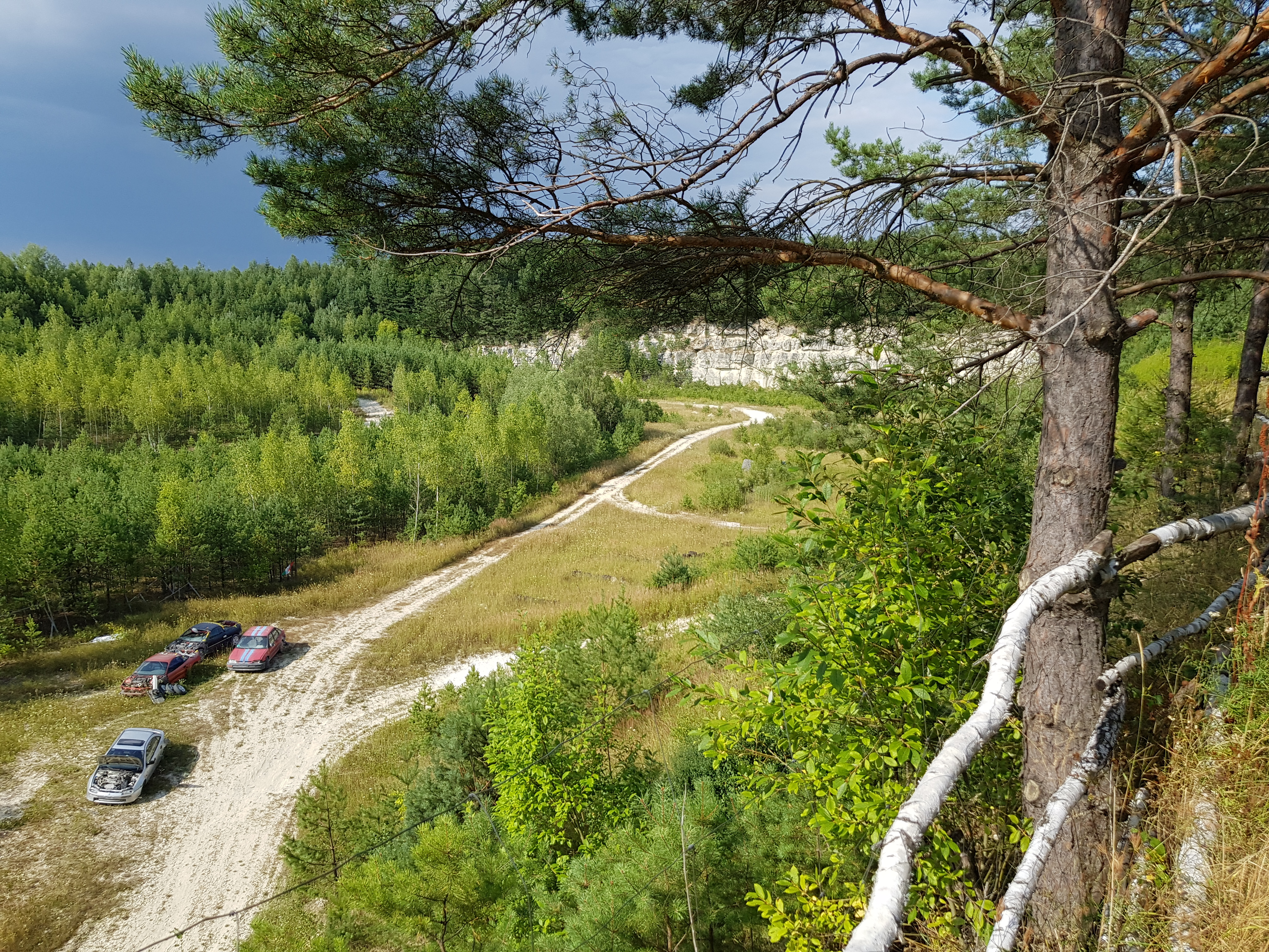 Widok na wyrobisko kopalni w Żelebsku